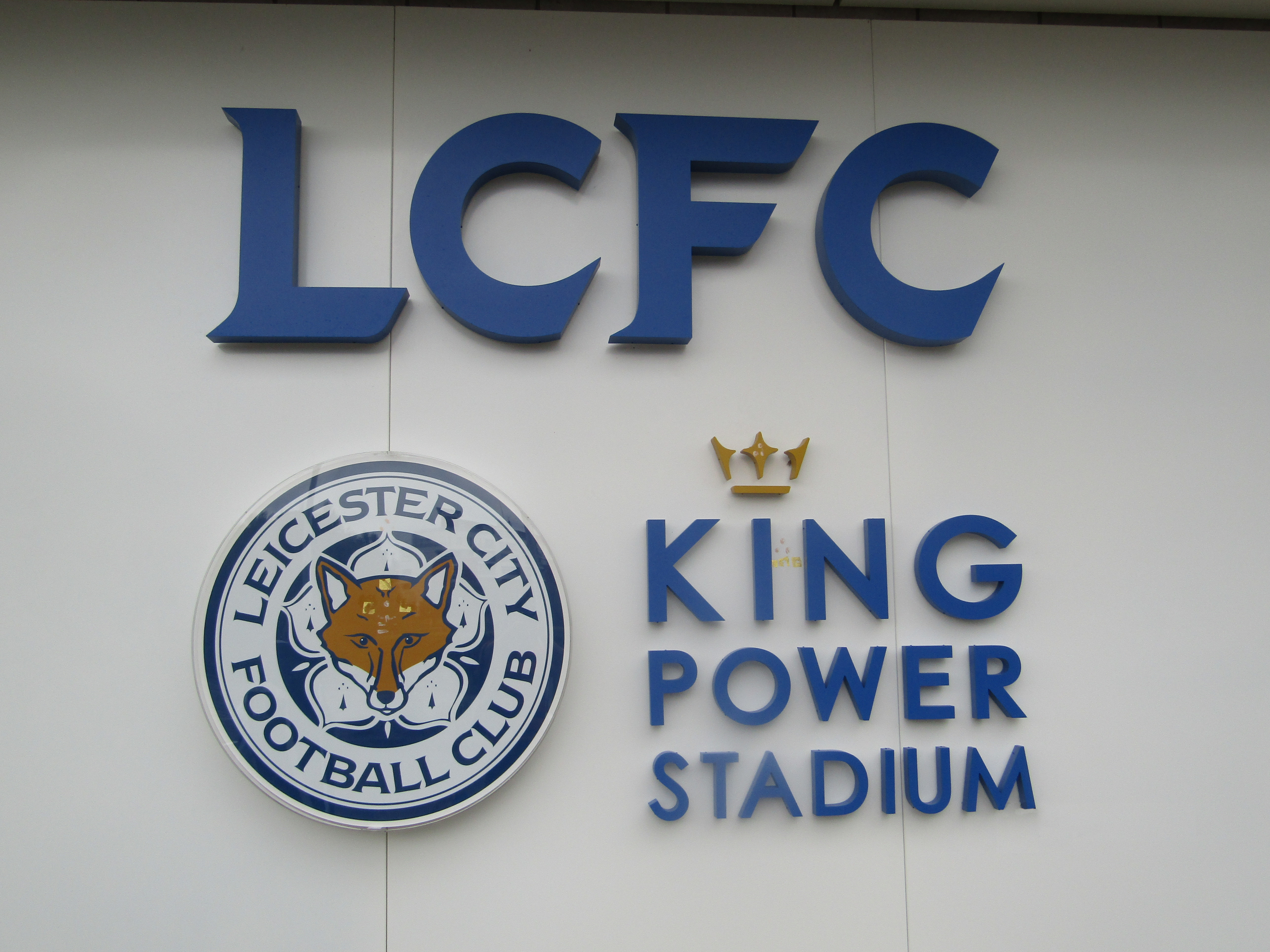 herb i nazwa stadionu